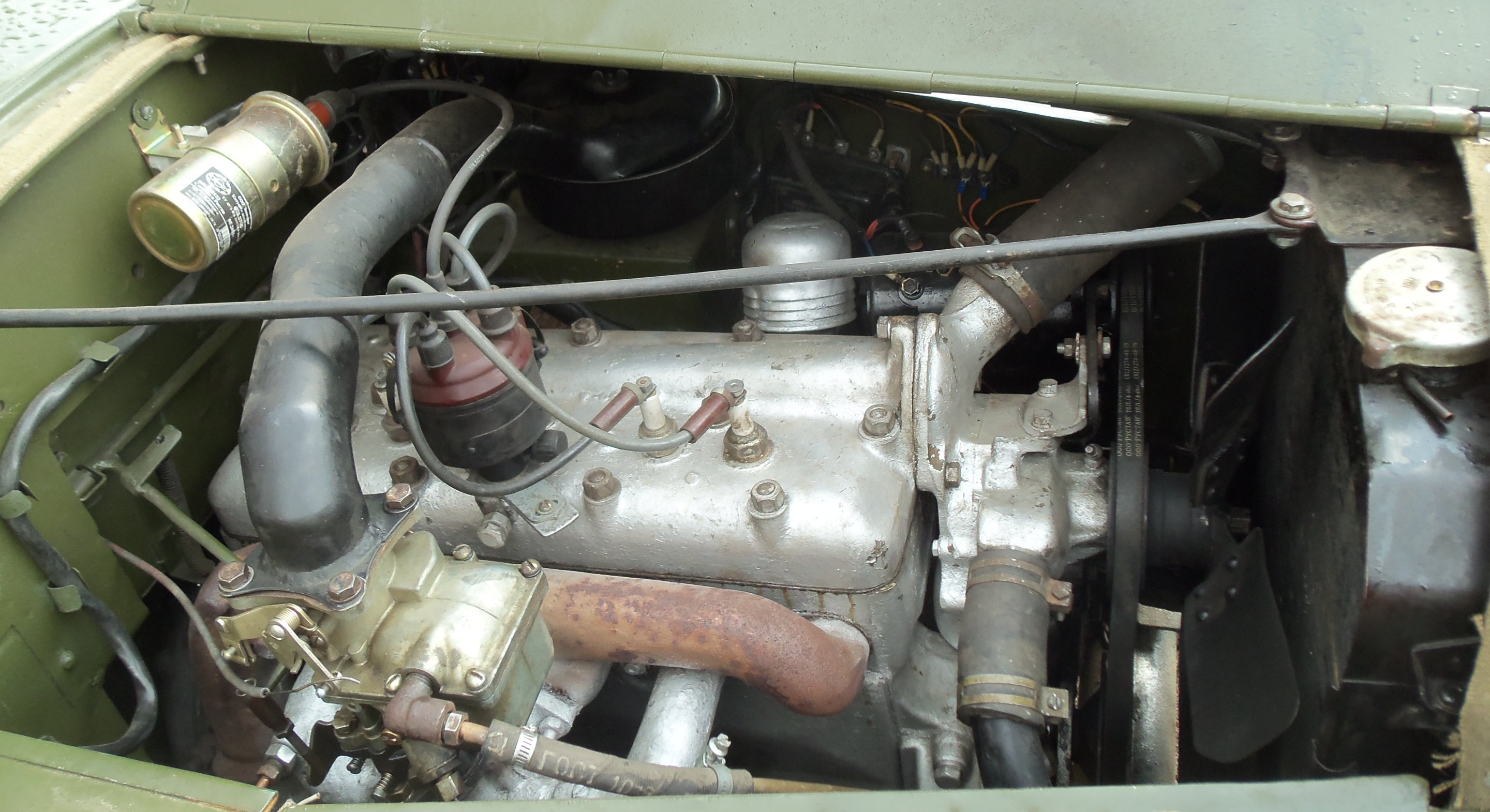 Мотор джипа ГАЗ-67Б «Русский Виллис» на выставке военной техники «Встречаем Победу в Политехническом» 5 мая 2012 года